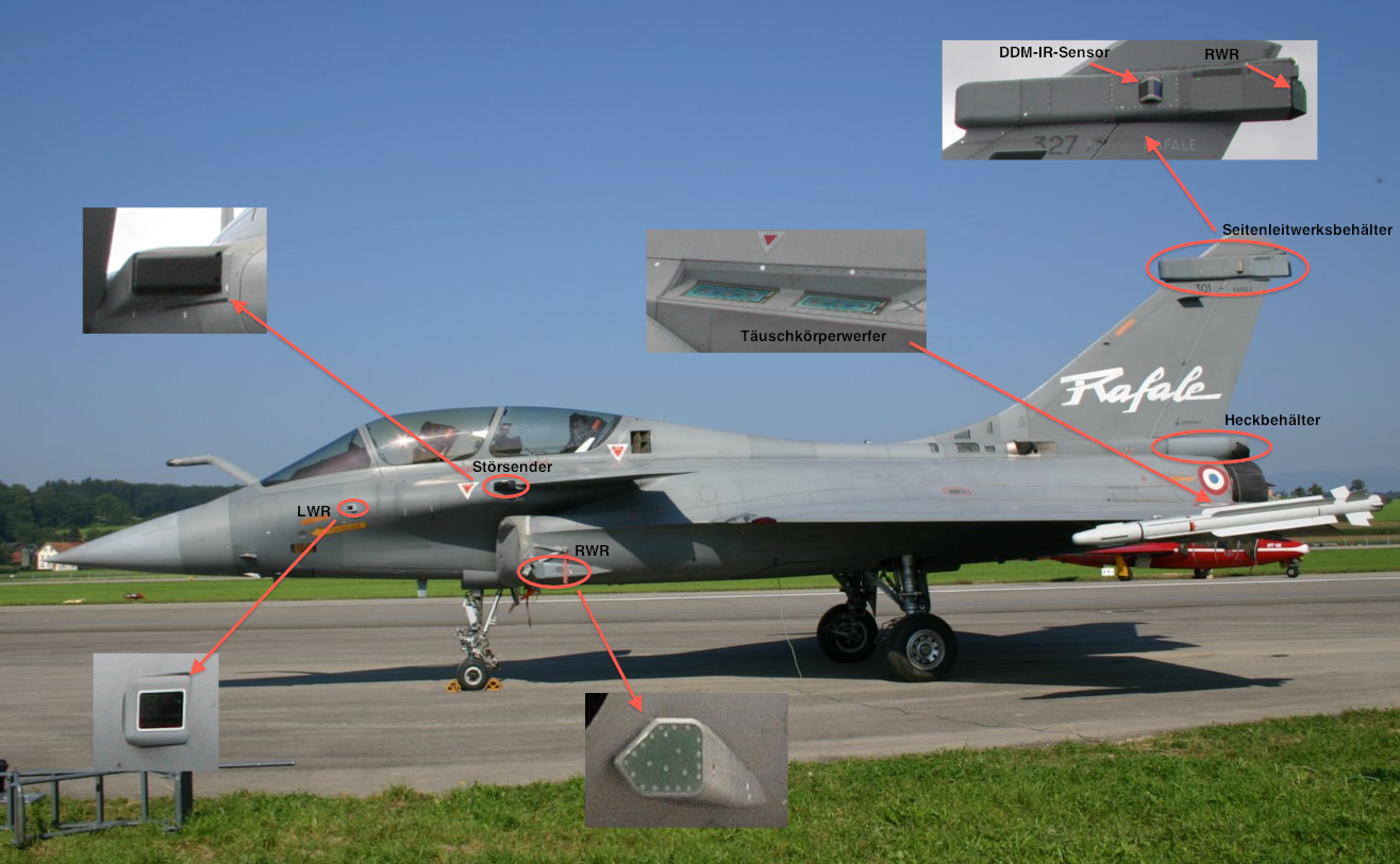 Description: Rafale *Auteur: Arnaud Gaillard (arnaud ) *Source: Photo de l'auteur *Note: Prise le 5 septembre 2004, exif présent pour infos complémentaires *License